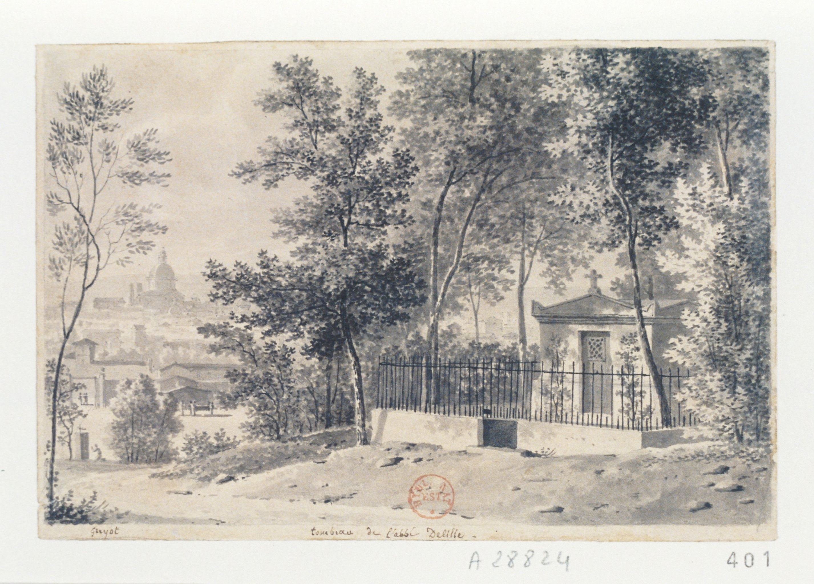 Dessin de la tombe de l'abbé Delille au cimetière du Père-Lachaise à Paris.